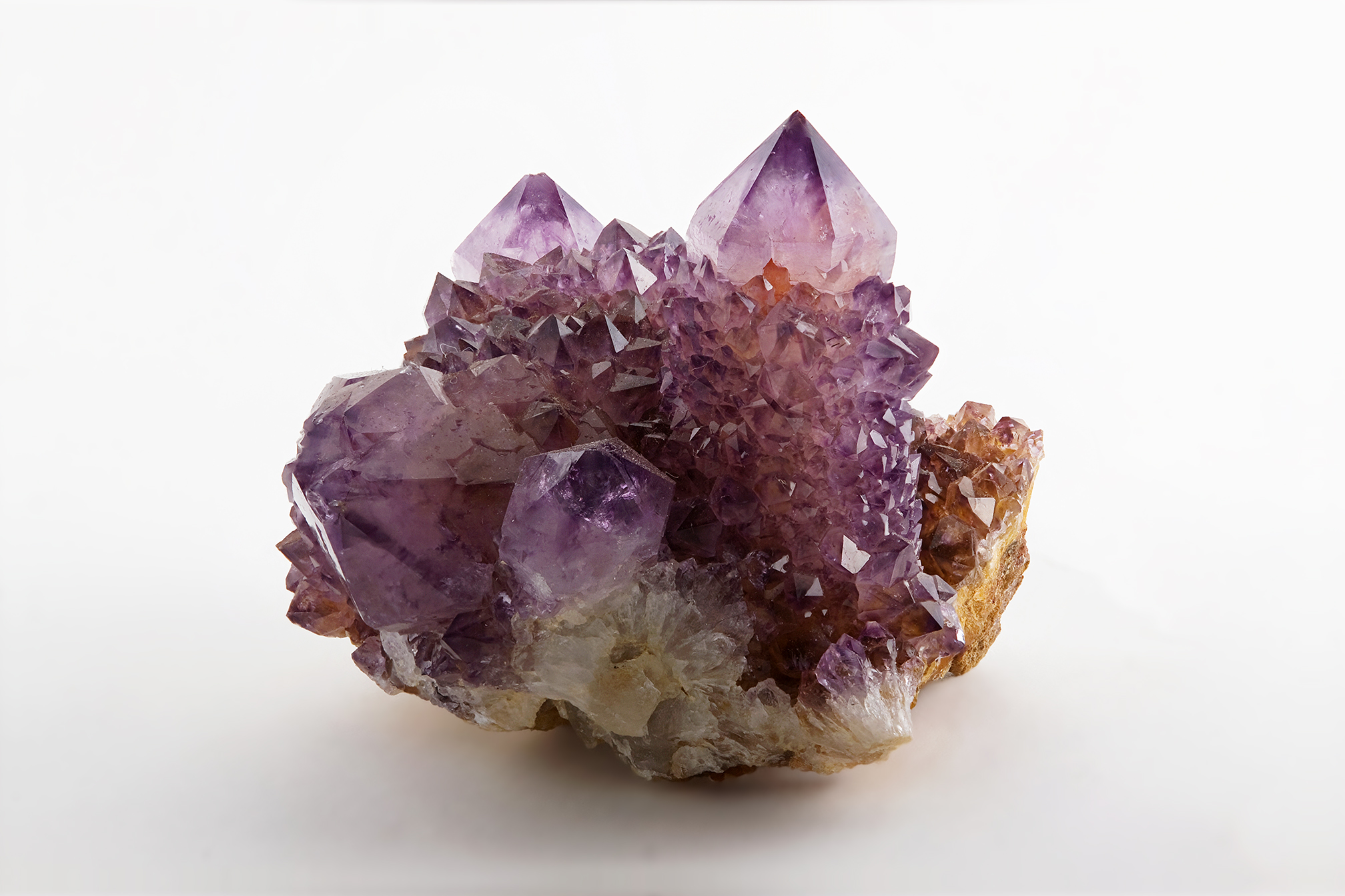 1.2 only